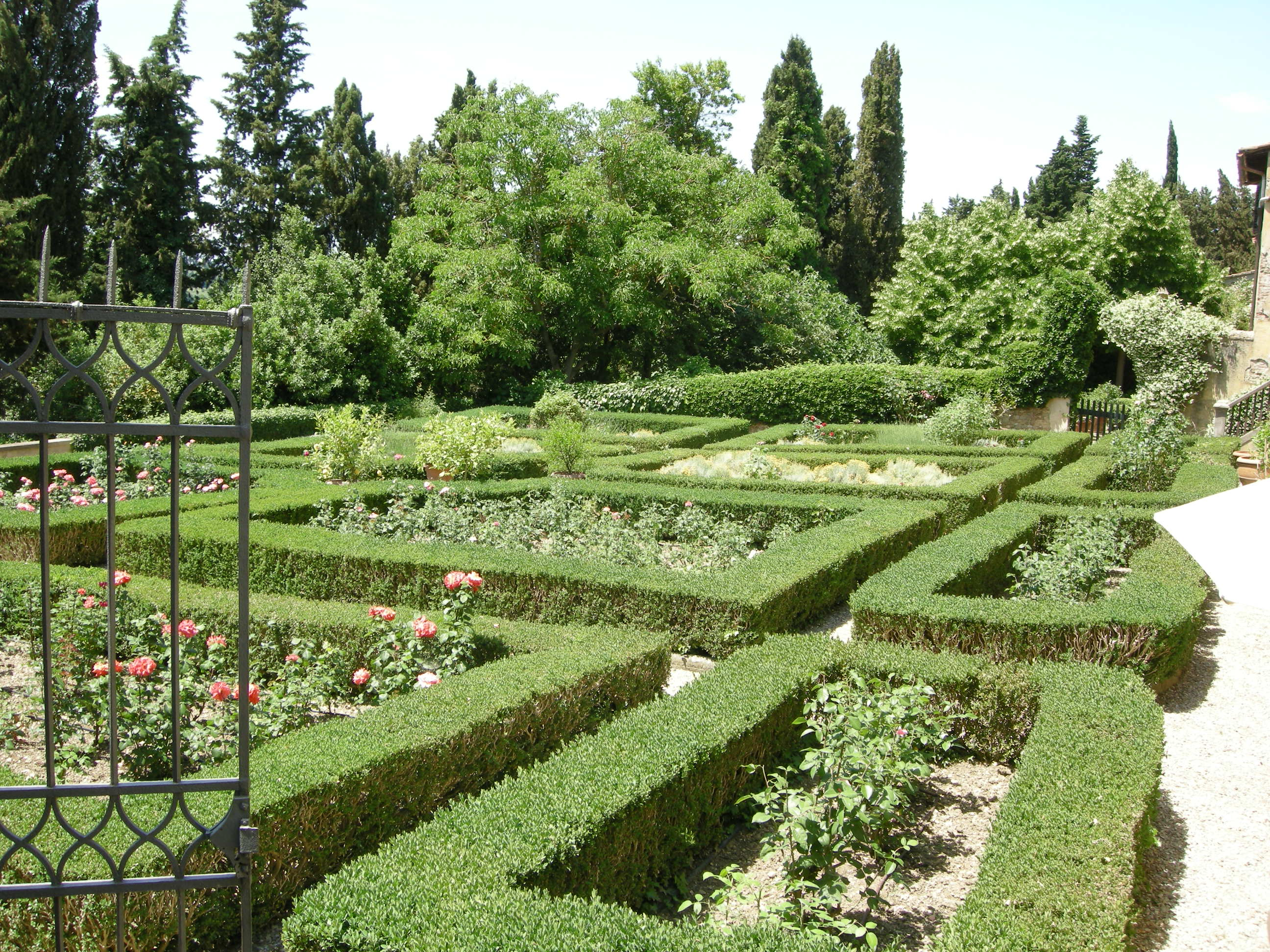 Villa badasseroni, giardino all'italiana